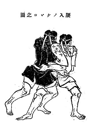 釣腰